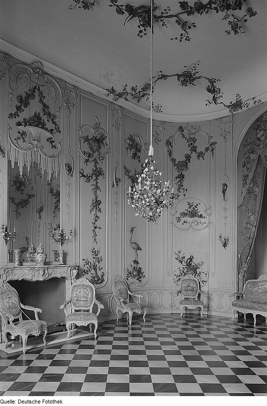 Original image description from the Deutsche Fotothek Potsdam. Schloss Sanssouci, Viertes Gästezimmer (Voltairezimmer), Blick nach Nordwesten